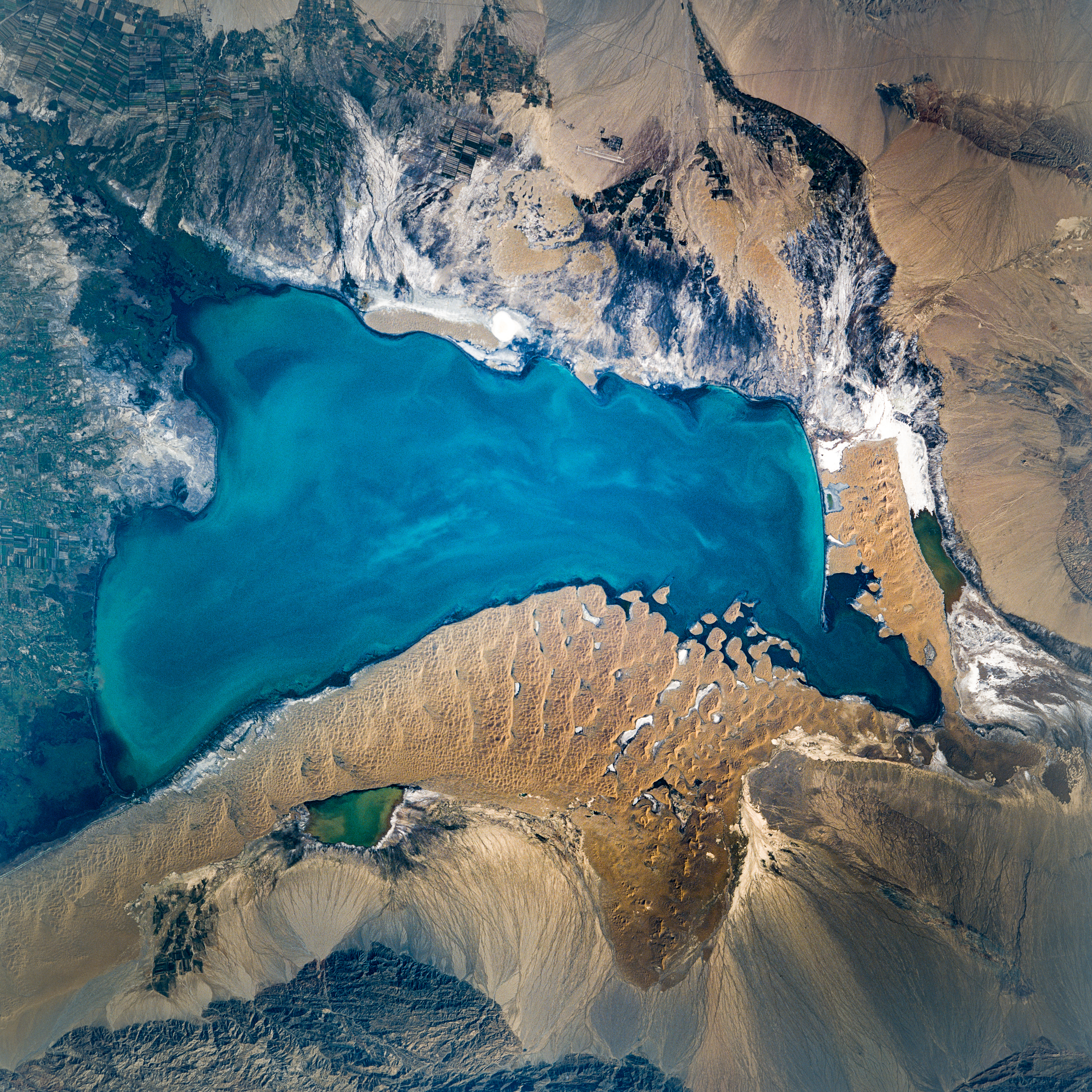 en: China, Xinjiang, Bosten Lake area. Satellite picture: 2. Nov. 2004. de: China, Xinjiang, Bosten-See. Satellitenaufnahme von dem Bosten-See am 2. November 2004. Blick von Süden Richtung Norden.